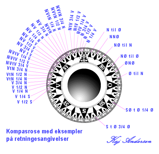 Viser navnene på den gamle kompasroses streger og deres kvartstregs-inddelinger.